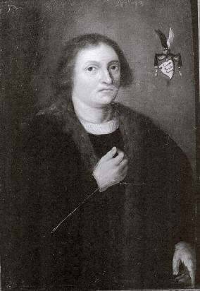 Dirk Jansz Helmer(overleed 1468 in Lotharingen), Houtkoper te Amsterdam, stamvader van het geslacht Bicker